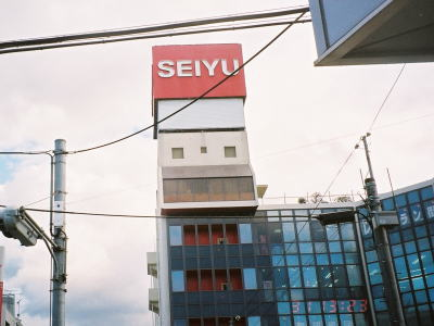 西友草津店店舗